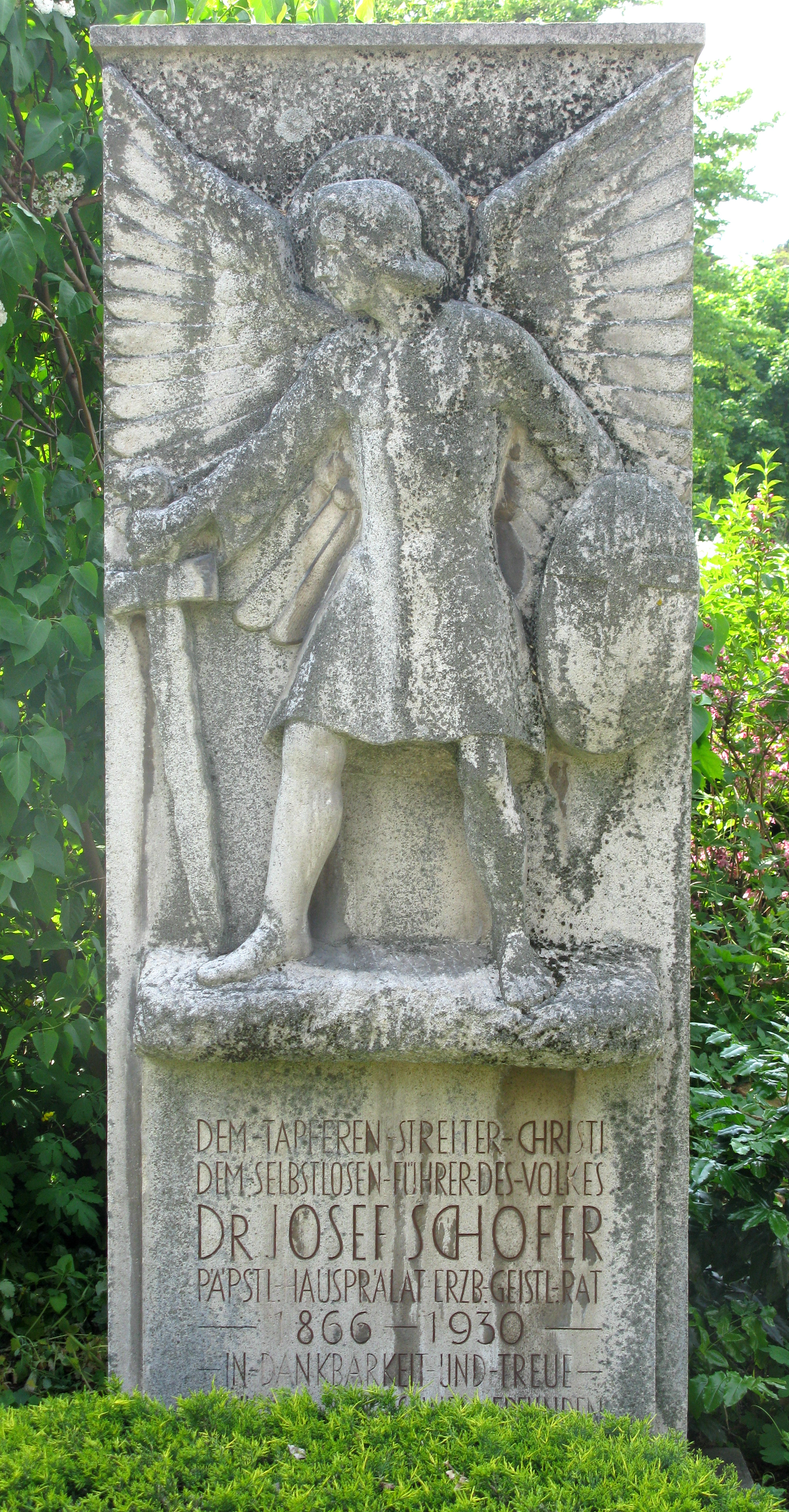 Schofer, Josef, Politiker + Priester, Grab auf dem Freiburger Hauptfriedhof